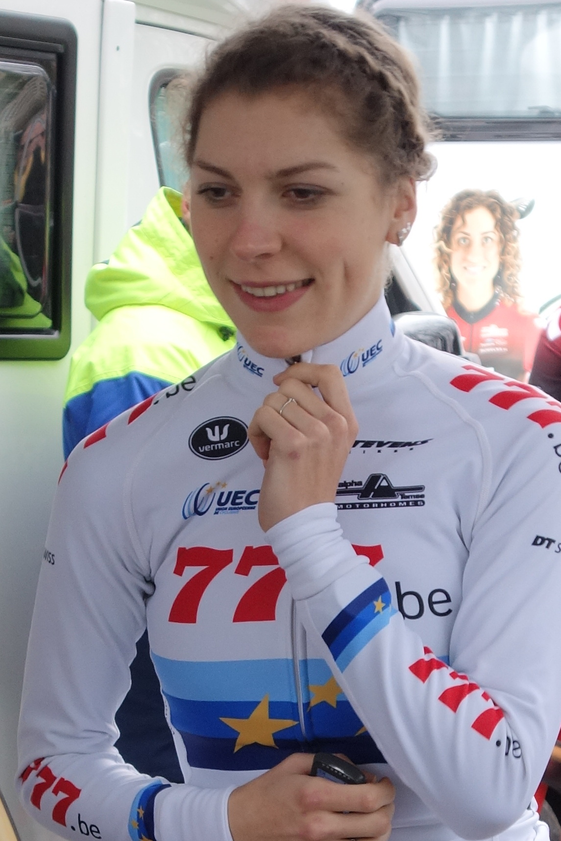 Voor de start van de tweede editie van de Brussels Universities Cyclocross (DVV Verzekeringen Trofee) op de campus van de VUB & ULB op zondag 5 januari 2020.